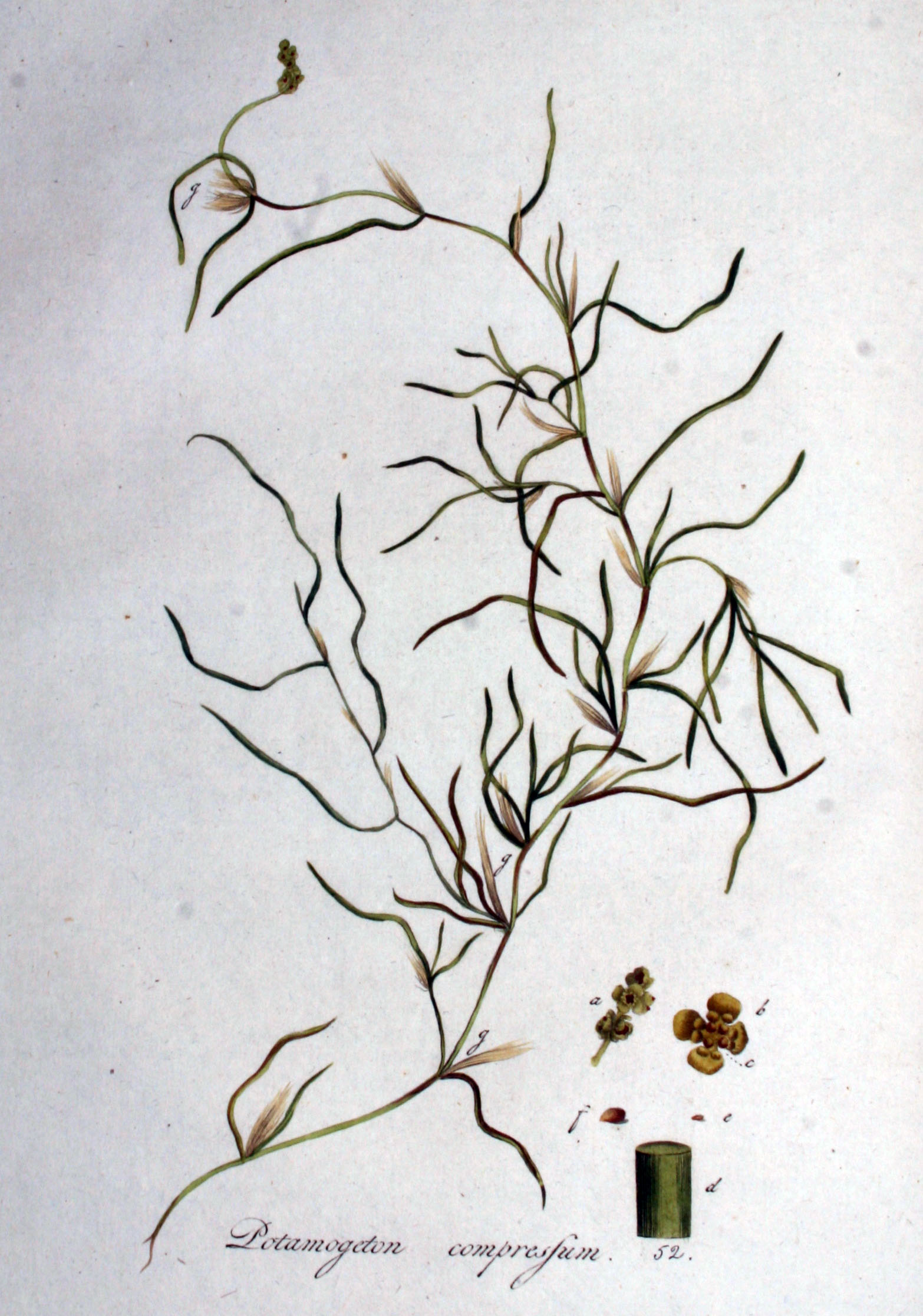 Potamogeton obtusifolius Mert & Koch